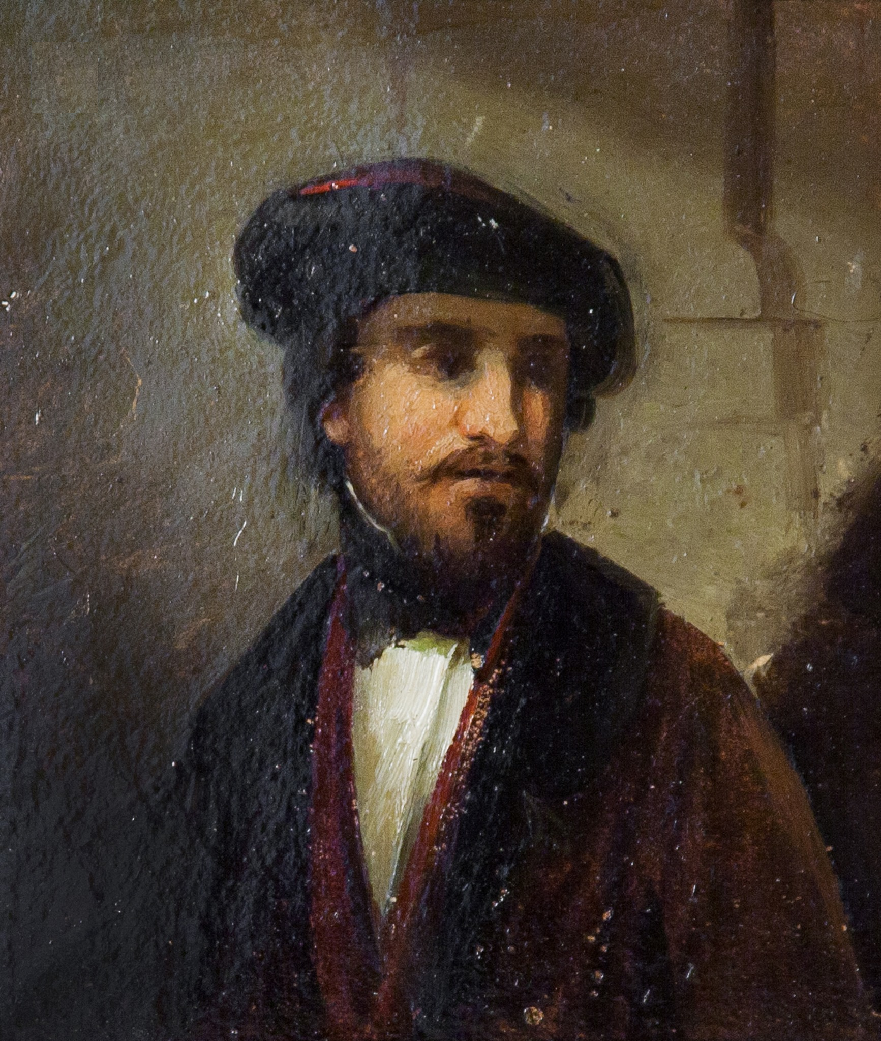 Gheorghe Tattarescu - Autoportret în timpul studiilor la Roma, ulei pe pânză, 0,17x0,13m - Muzeul Gheorghe Tattarescu